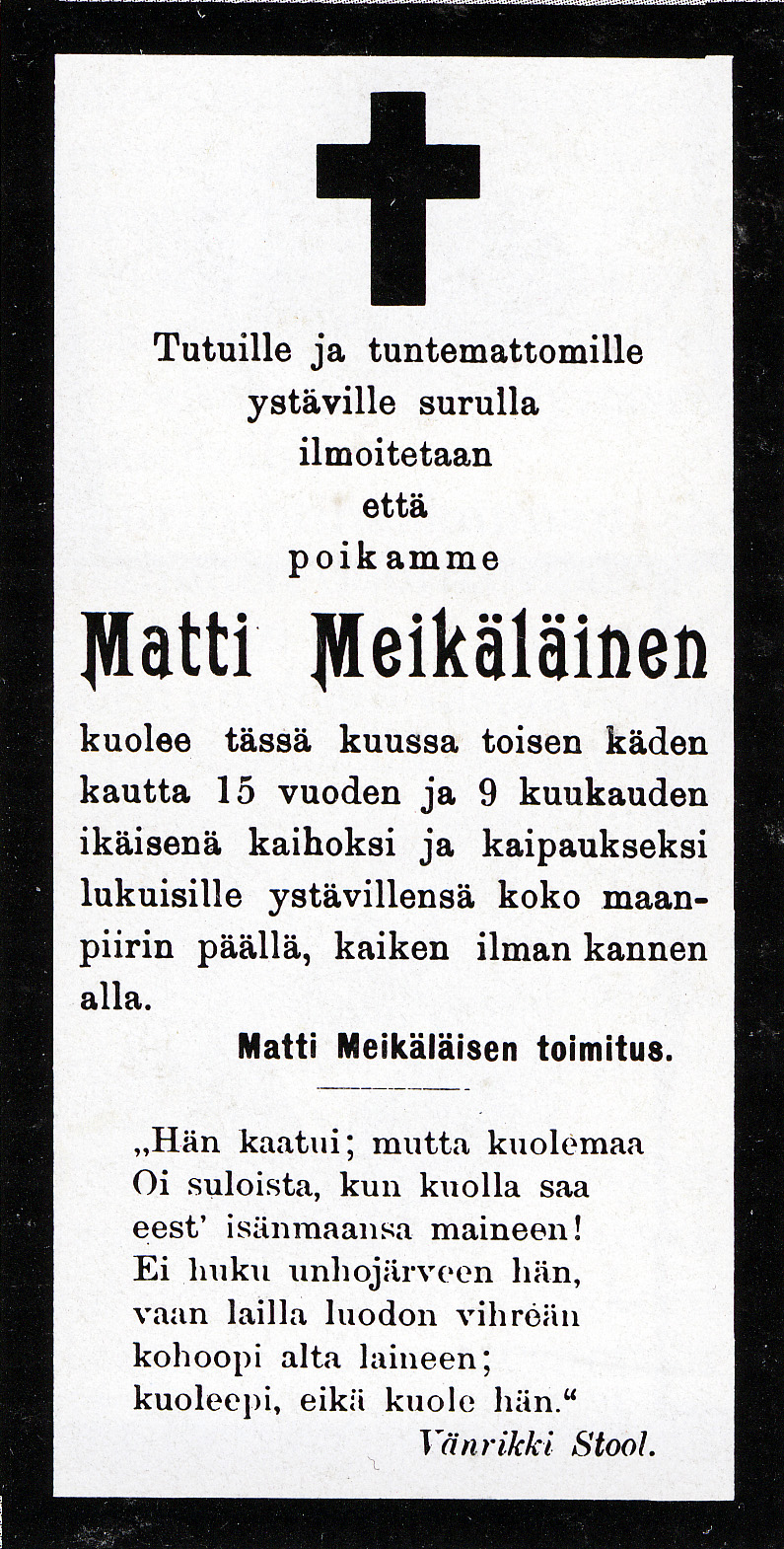 Pilalehti Matti Meikäläisen viimeisessä numerossa ilmestynyt "kuolinilmoitus"; lehti joutui venäläisen sensuurin lakkauttamaksi.